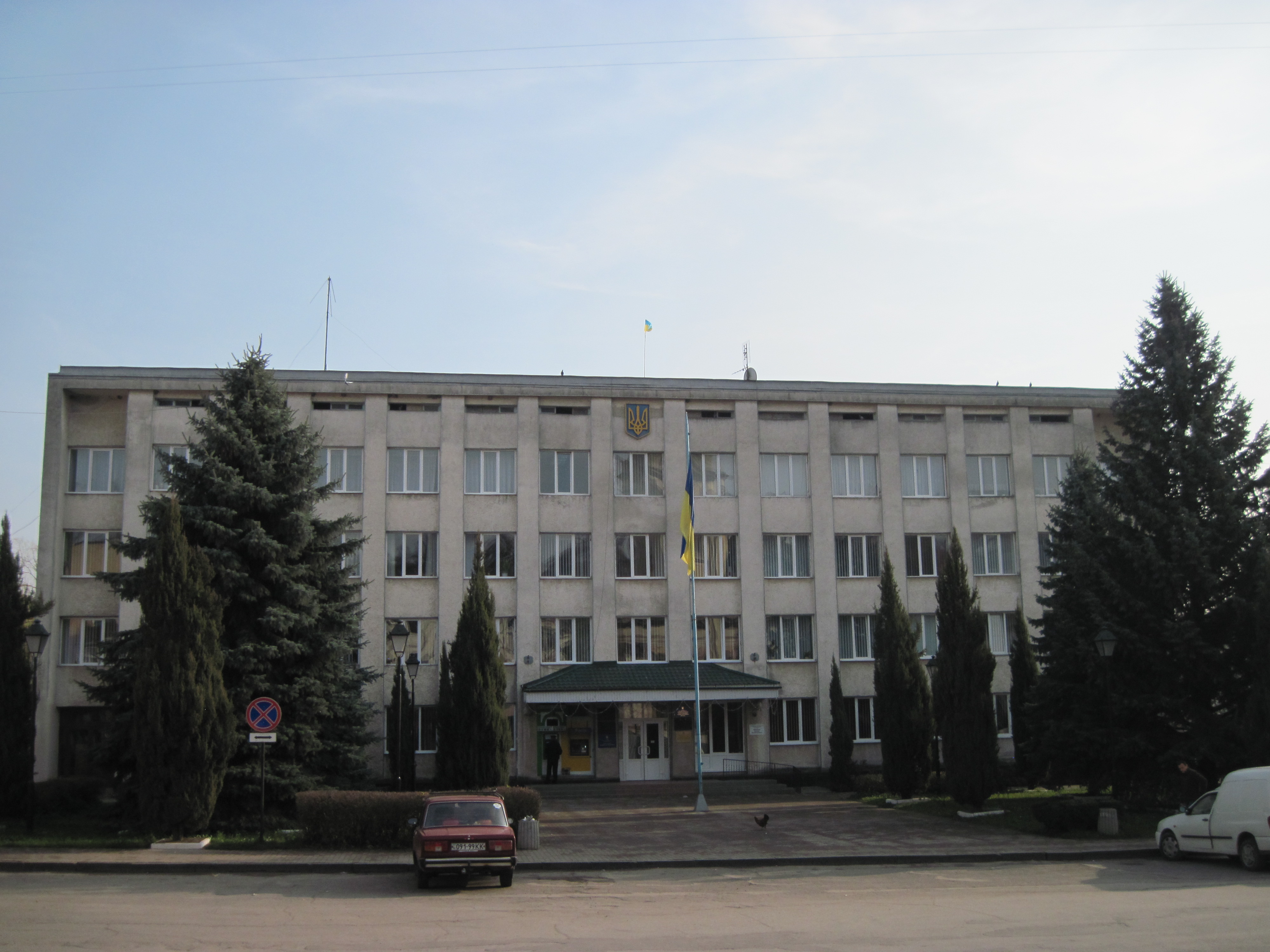 Будівля райадміністрації. Бучач, осінь 2013